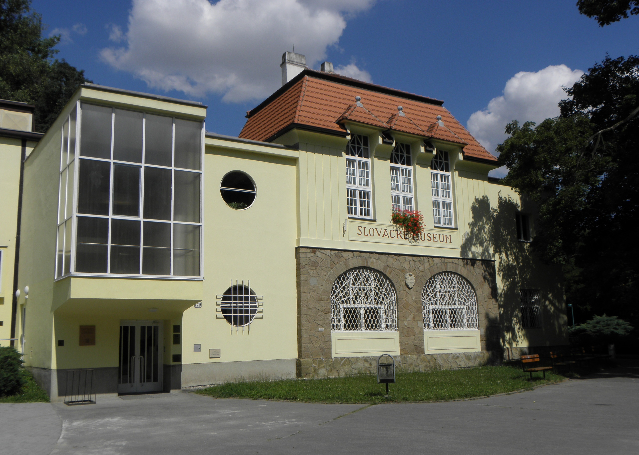 Hlavní budova Slováckého muzea v Uherském Hradišti; Uherské Hradiště (CZ)